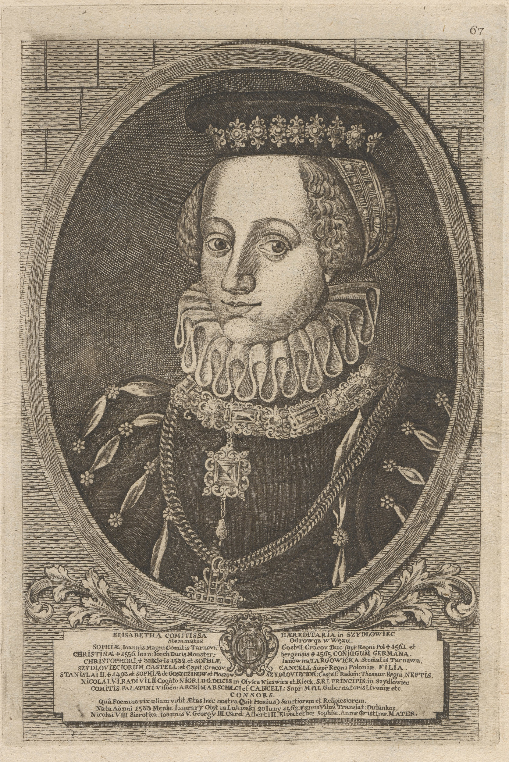 Беларуская (тарашкевіца): Партрэт Альжбеты Радзівіл (Alžbieta Radzivił) з роду Шыдлавецкіх (Šydłaviecki))